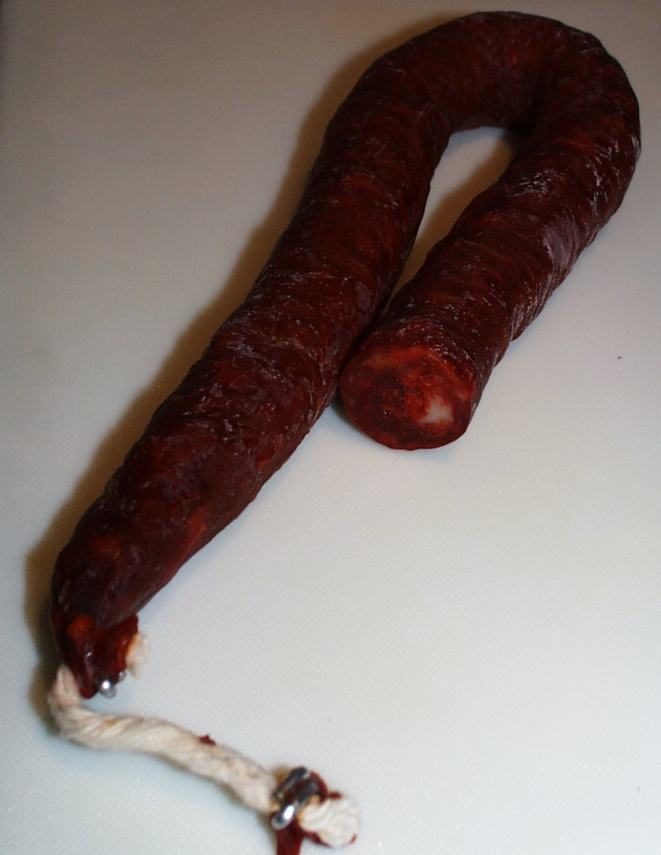 Sarta de chorizo Taken by myself, Benutzer:Ardo Beltz, on 2005-02-24 --Ardo Beltz 18:22, 24 Feb 2005 (UTC)